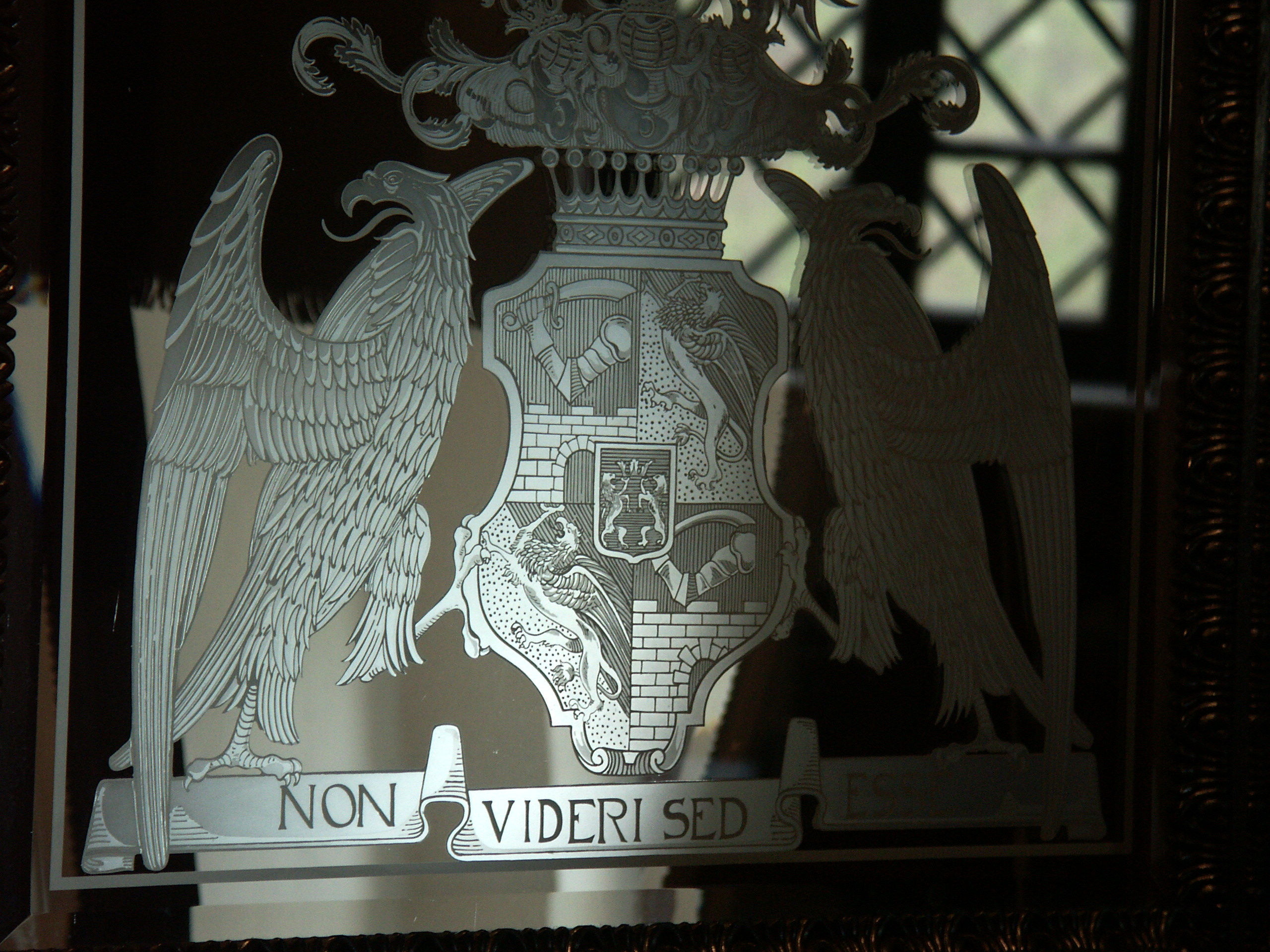 Krasznahorka vára (szlovákul: Hrad Krásna Hôrka)